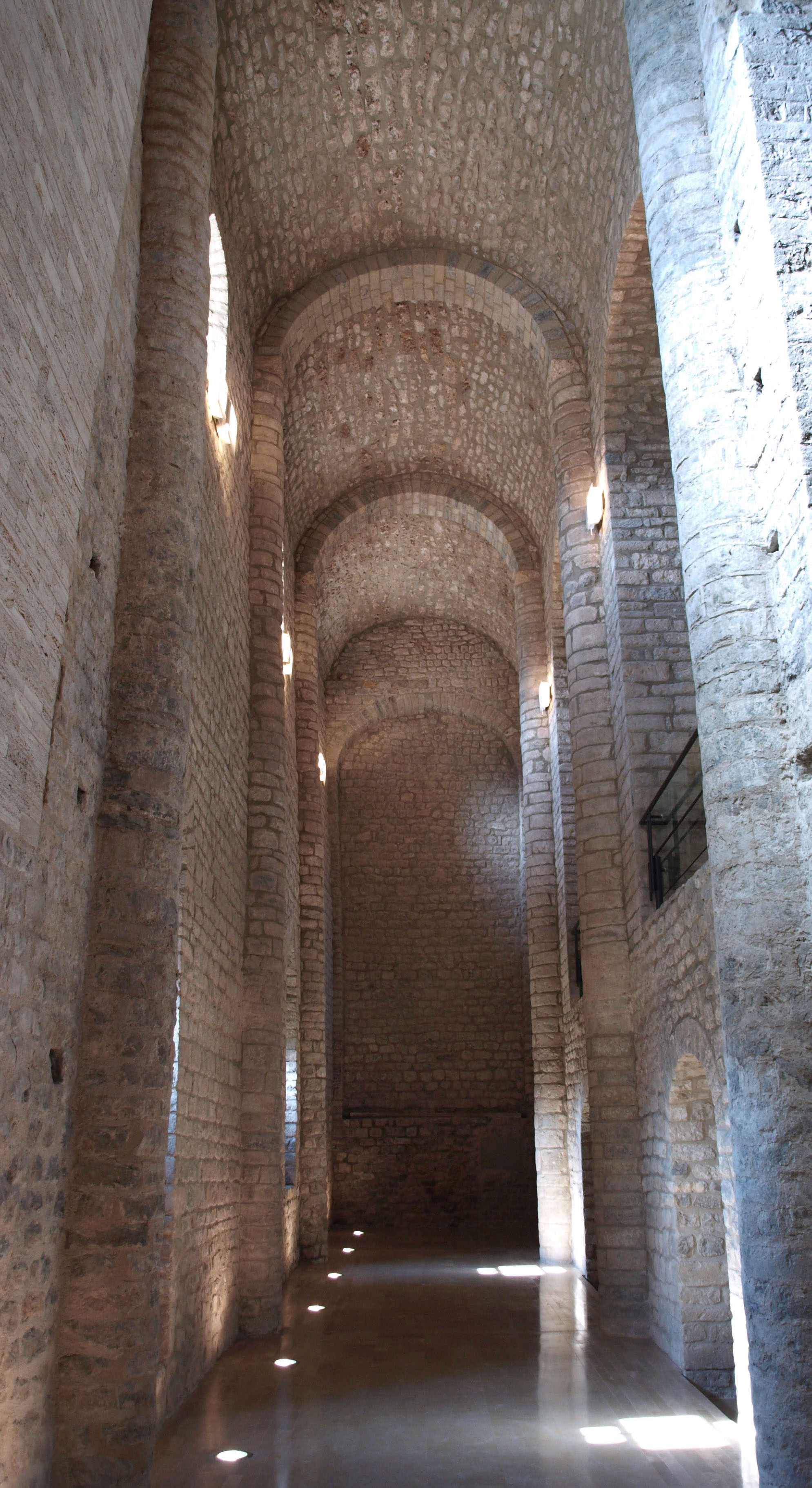 Església de Sant Llorenç prop Bagà (Guardiola de Berguedà)